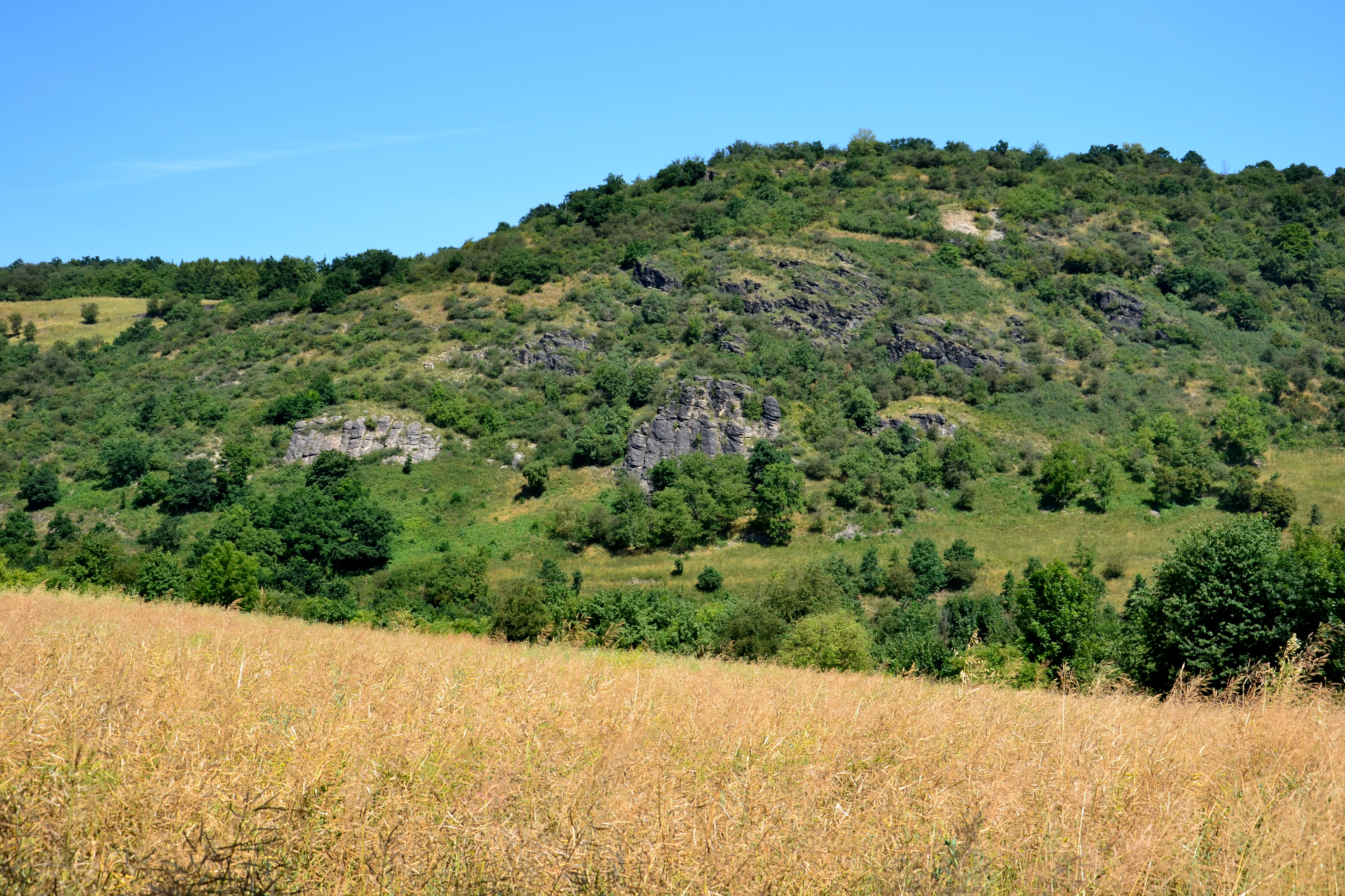 PR Rač z jihu (od Brozánek)